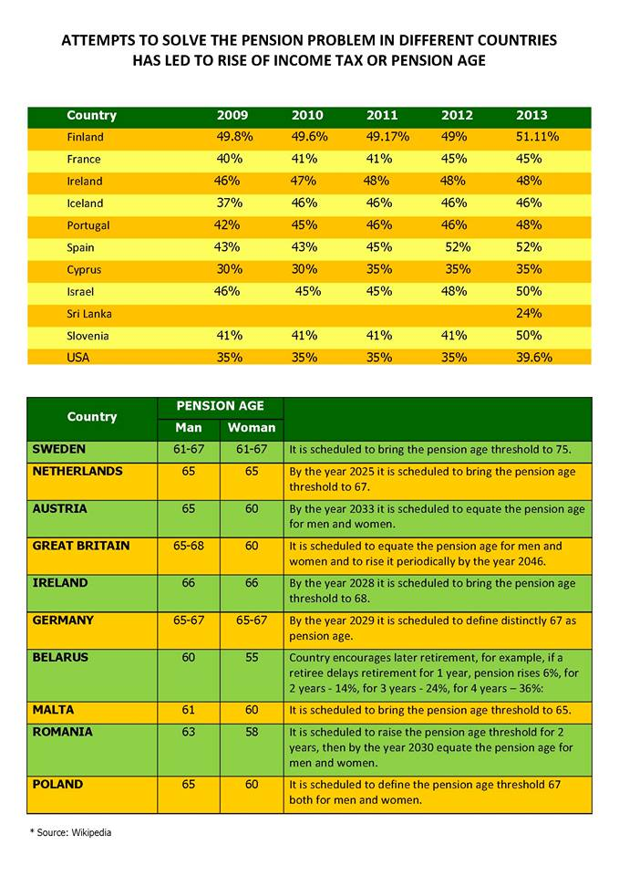 Ænglisc: Armenian